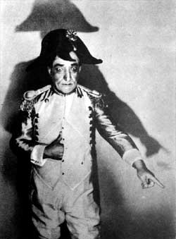 Constantin Tănase playing Napoleon